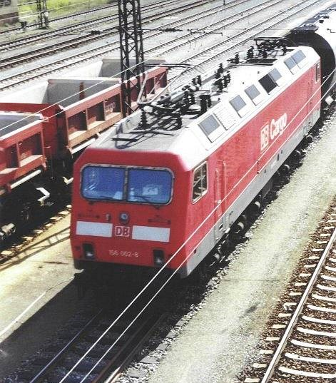 156 002 mit einem Güterzug in Dresden-Friedrichstadt